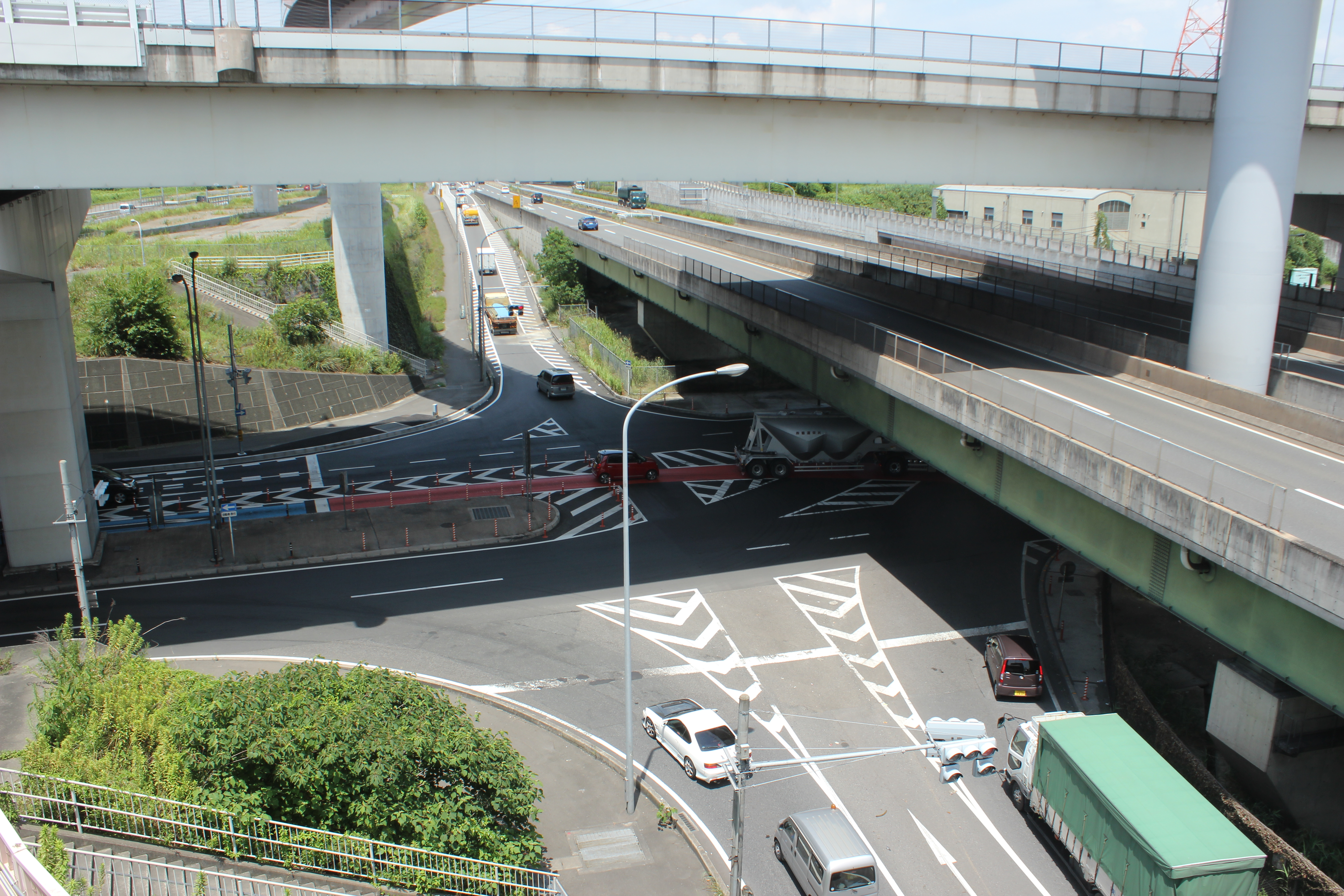 国道302号、国道247号交差点の東海インターチェンジ